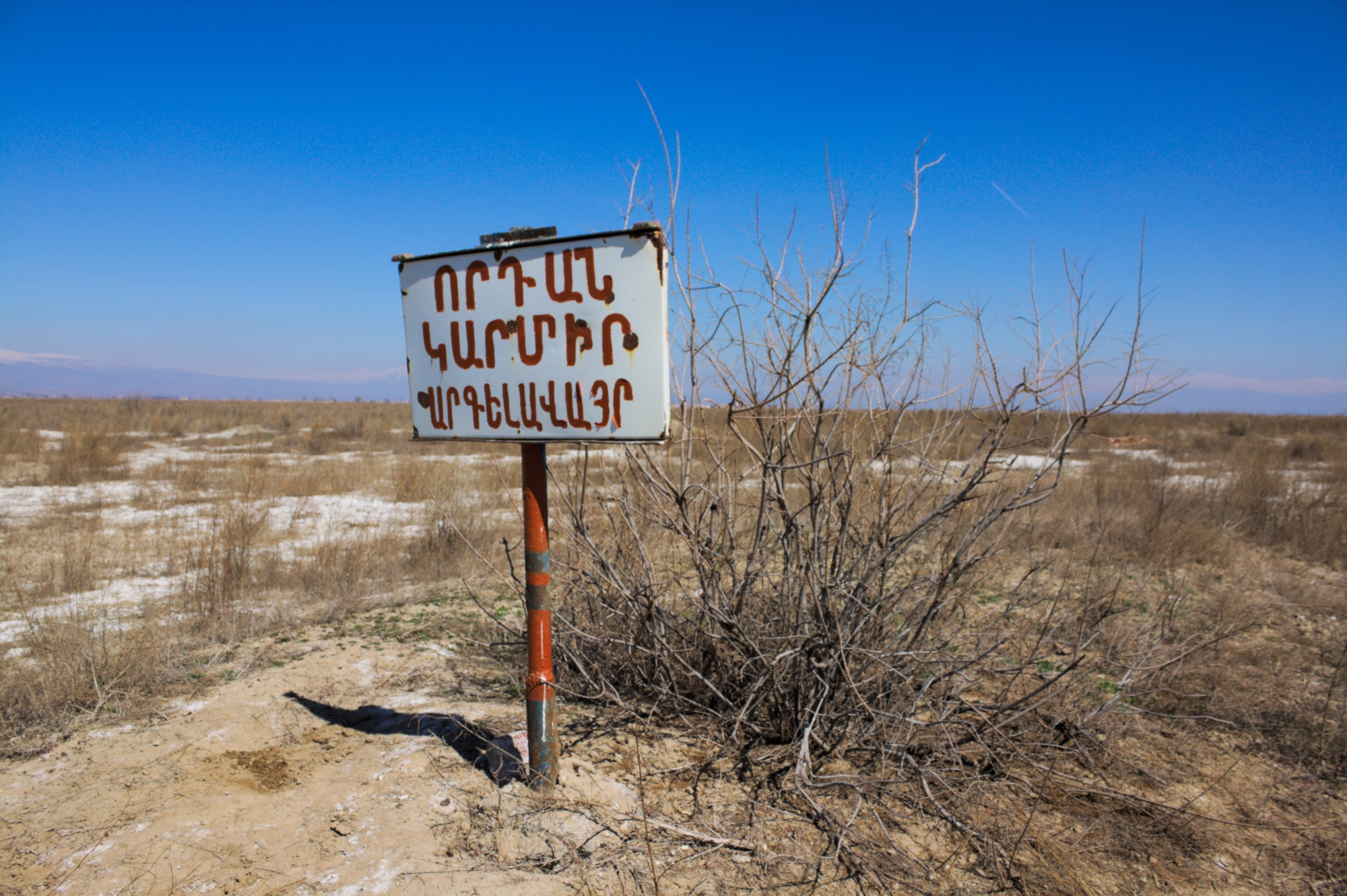 Որդան Կարմիր արգելավայր